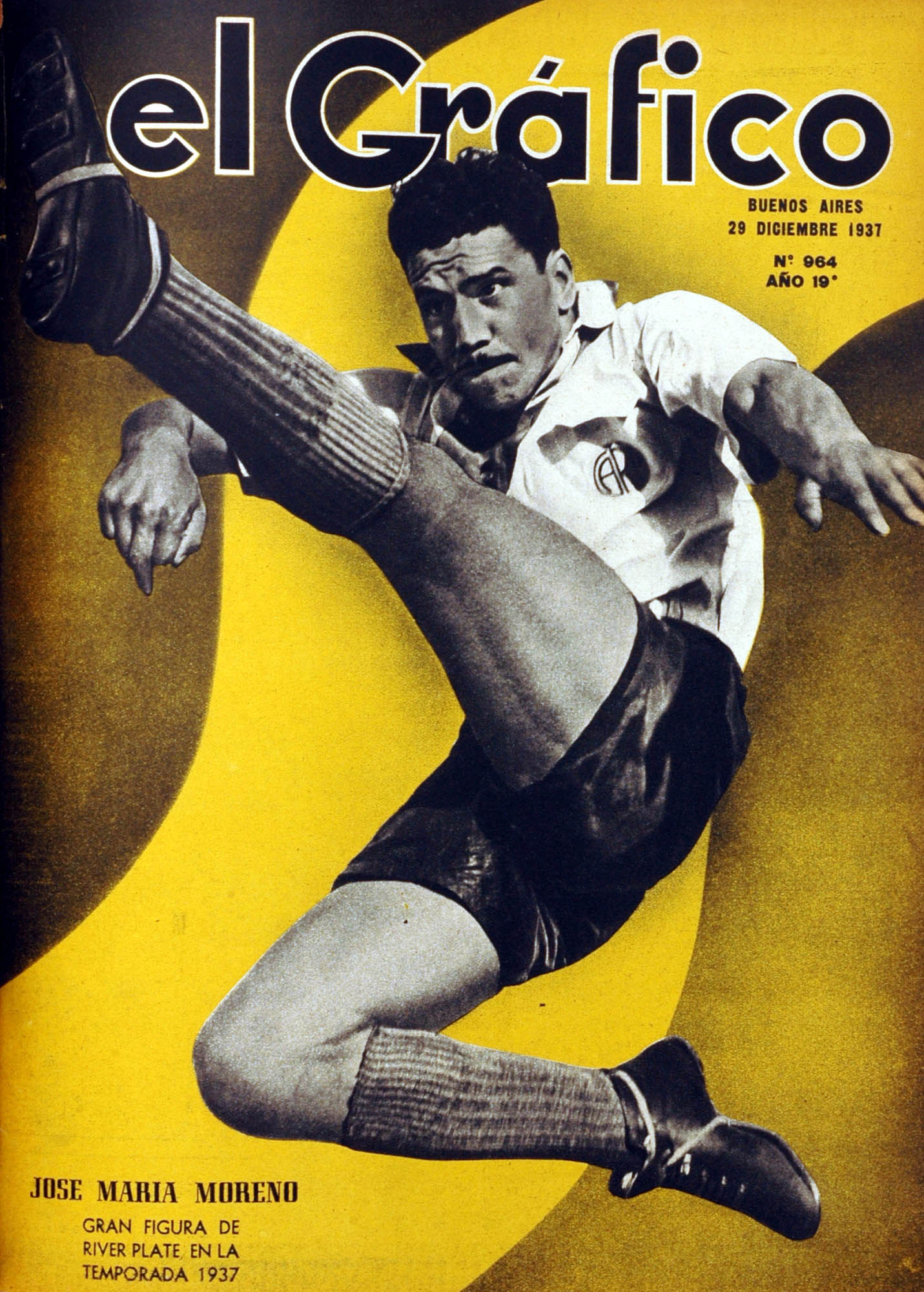 El Grafico del 29 de Diciembre de 1937. Edicion 964